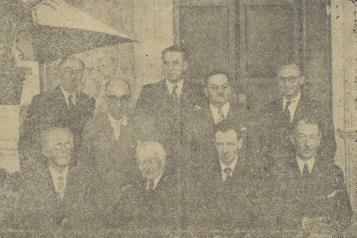 Comité directeur de l'institut celtique : en bas, de gauche à droite : Arzel Even, Régis-Marie-Joseph de L'Estourbeillon de La Garnache, Roparz Hemon, P.Mocaër. en haut, de gauche à droite, Hémar, Bernard Roy, Goinard, Jaigu, Yann Fouéré